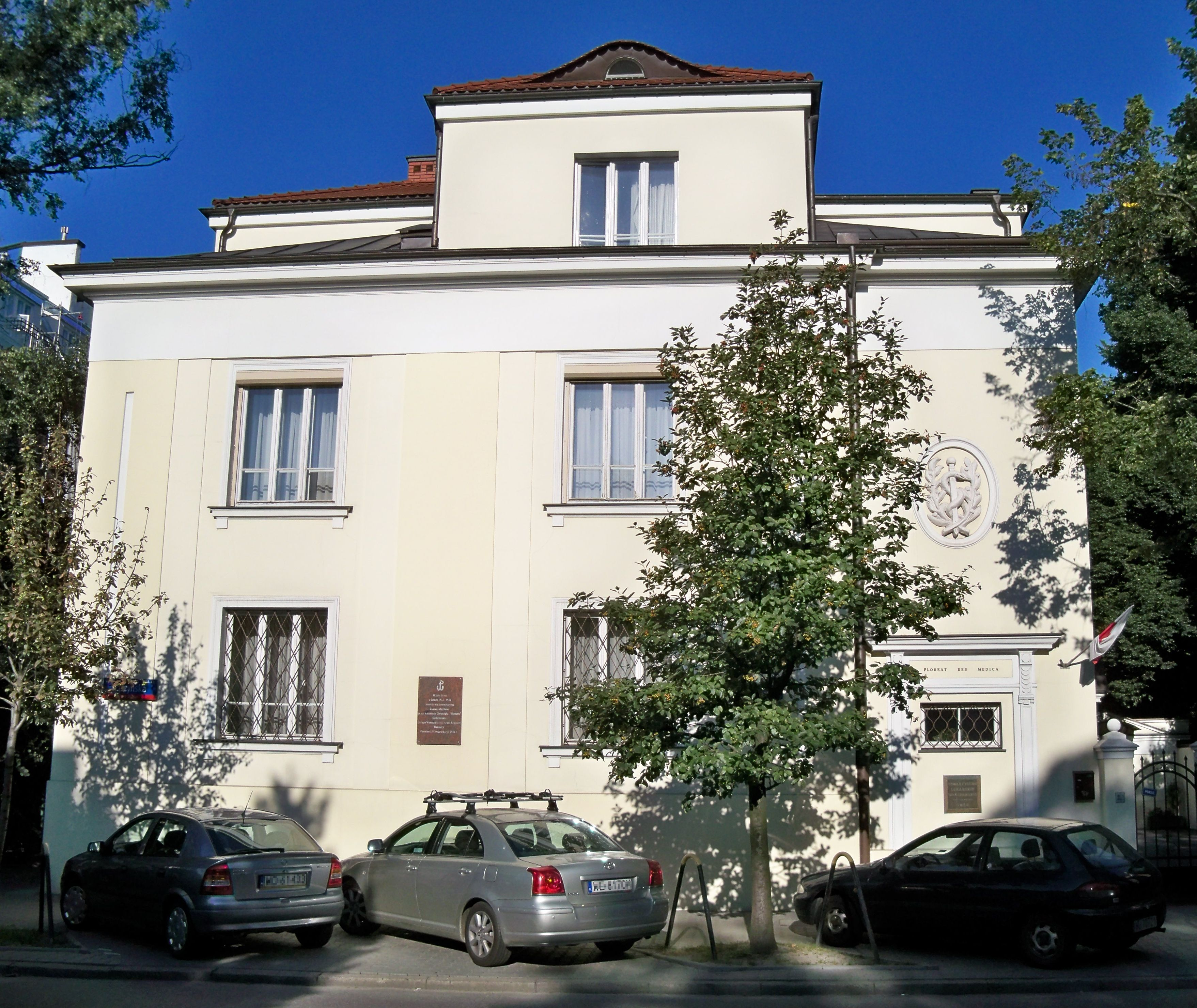 Siedziba Towarzystwa Lekarskiego Warszawskiego. Ul. Raszyńska 54 w Warszawie.